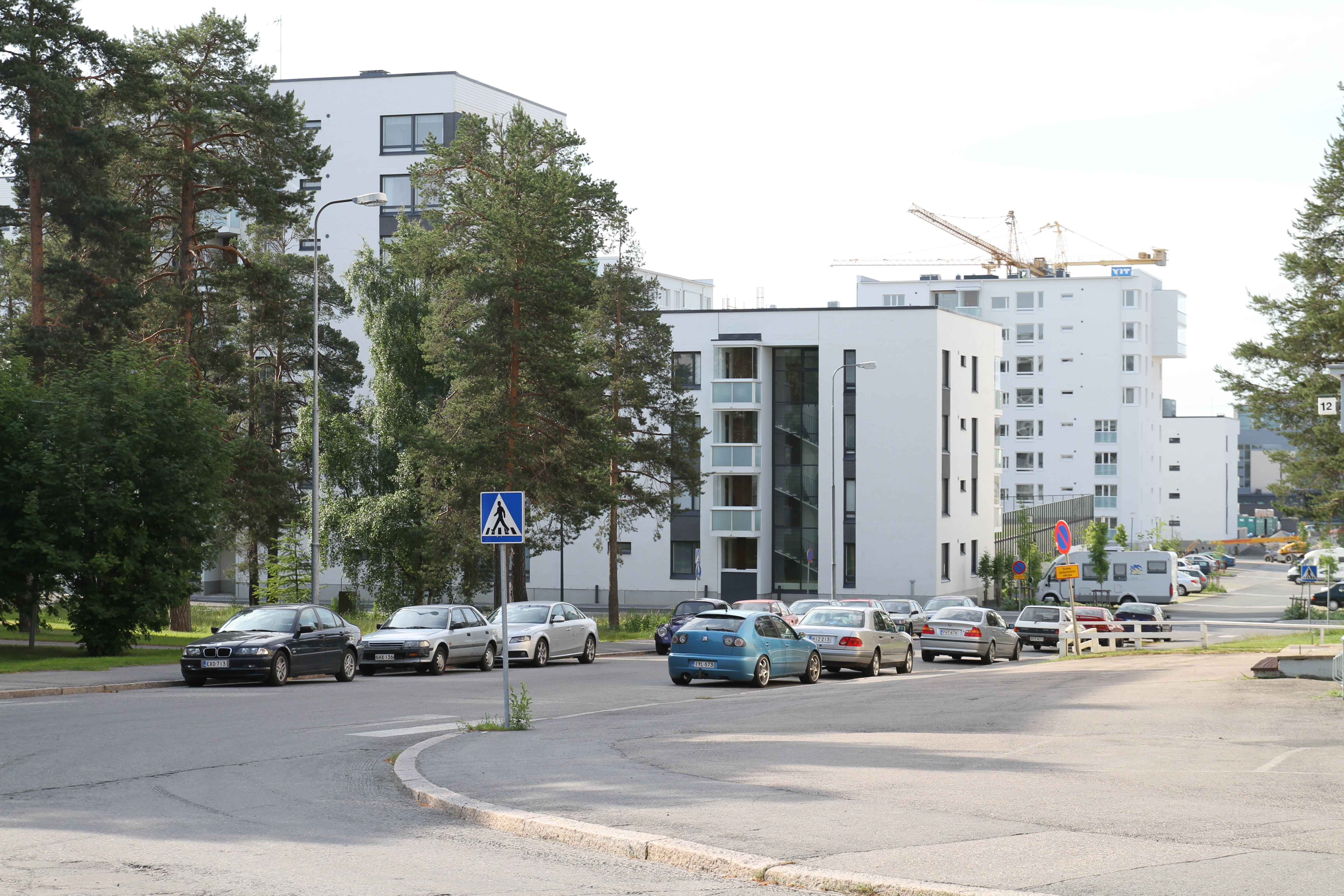 Uudisrakennuksia Oulun Alppilassa kesäkuussa 2010.